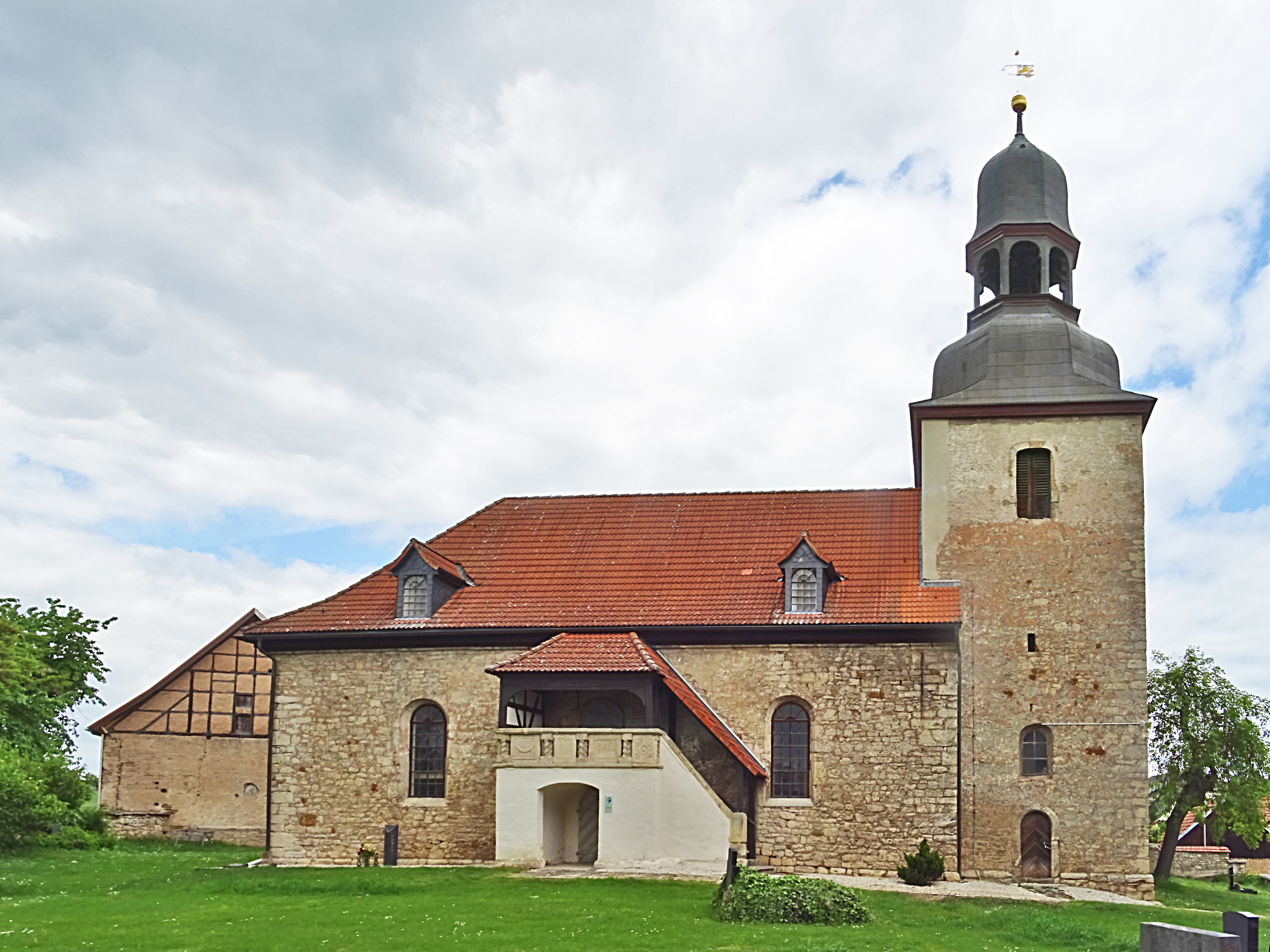 Dorfkirche St. Georg in Niederbösa von Süden